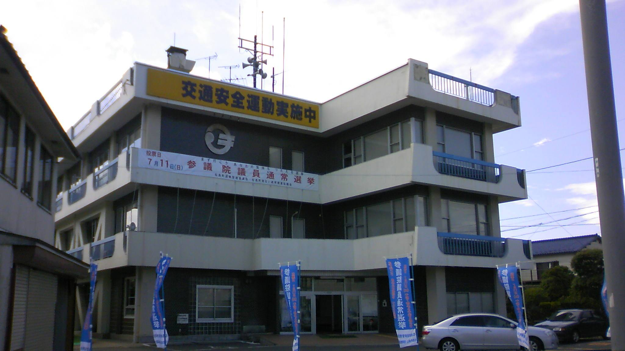 松島町役場